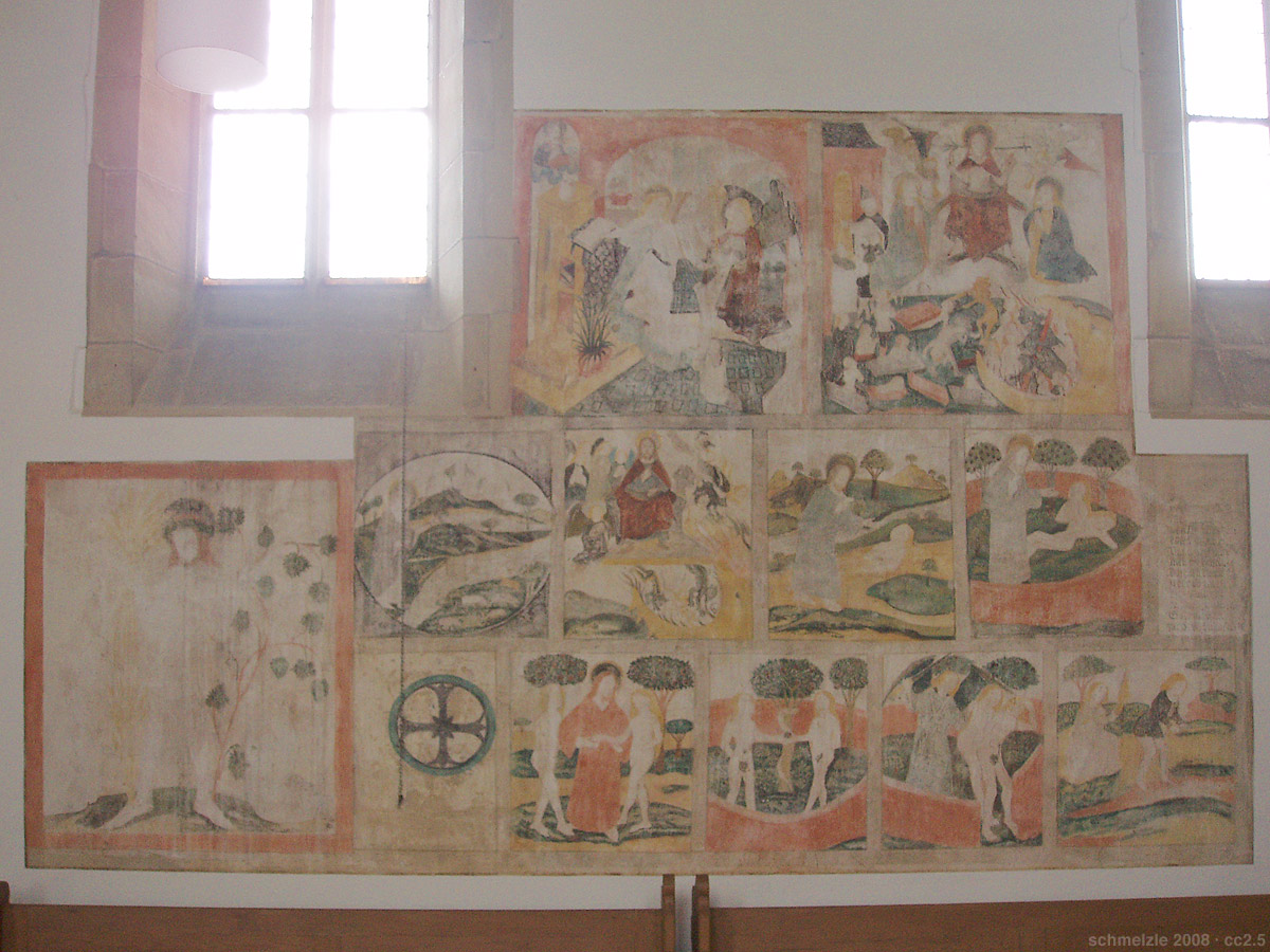 Cornelienkirche in Bad Wimpfen, Wandfresken